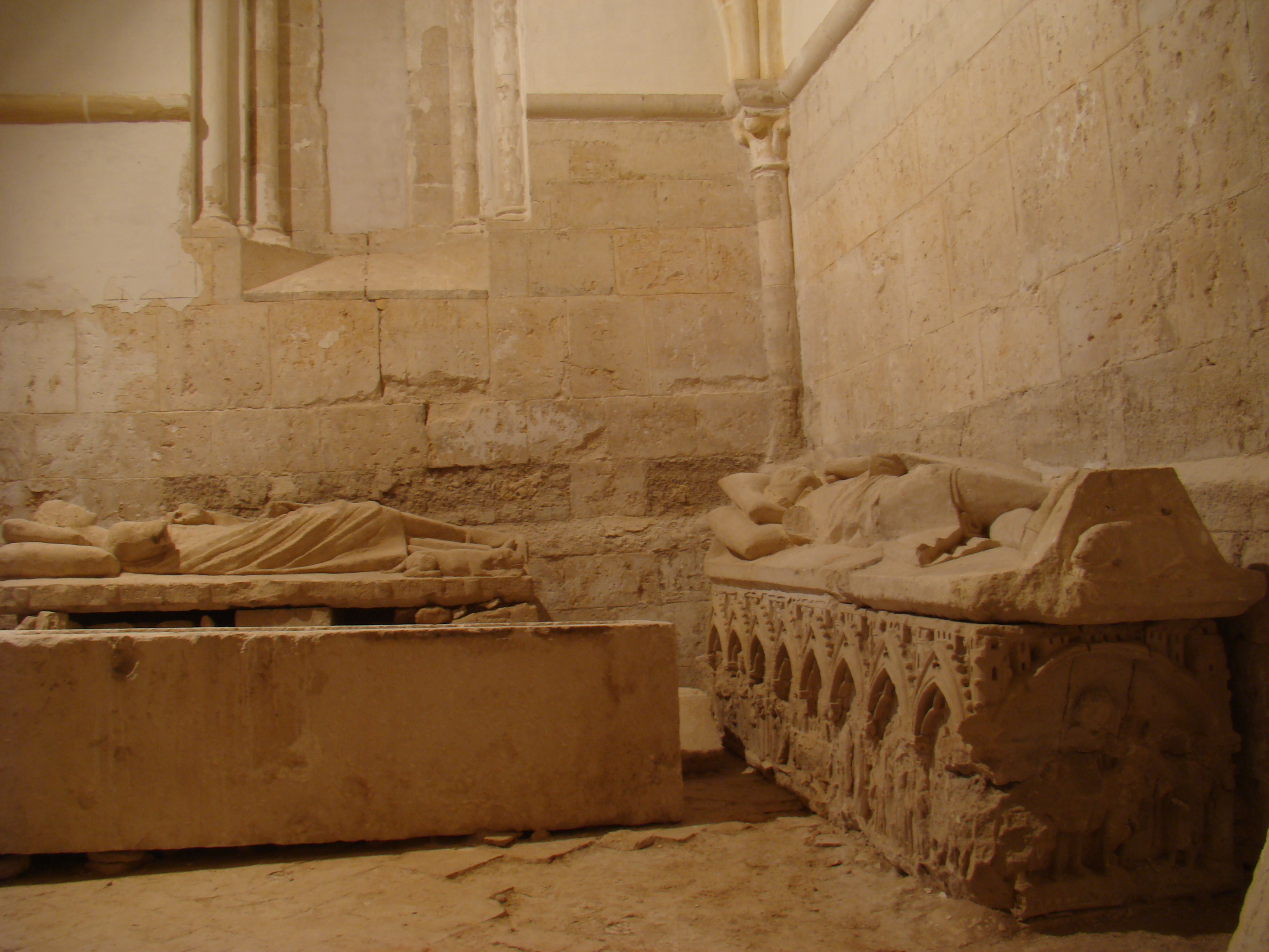 Monasterio de Palazuelos en la provincia de Valladolid. Capilla funeraria de Santa Inés donde han sido recogidos todos los sarcófagos que estaban diseminados por la iglesia sin ningún orden y expuestos a su destrucción. No ha sido posible su verdadera identificación ni relación con el personaje enterrado. Corresponden a los siglos XIII y XIV.